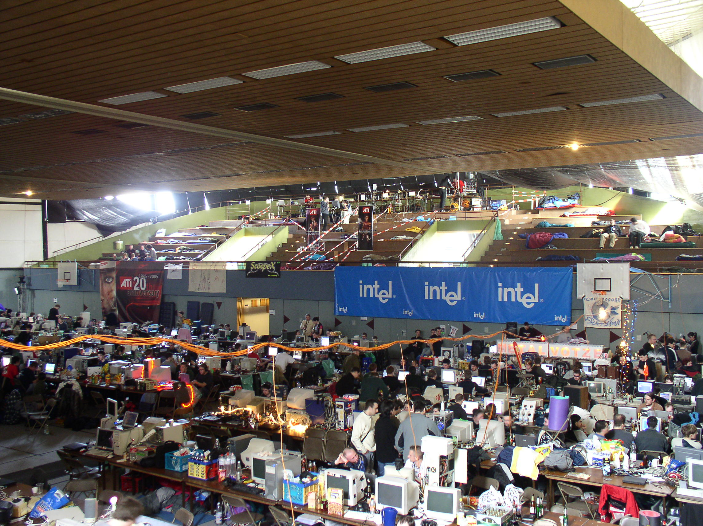 Breakpoint 2005, Main Hall